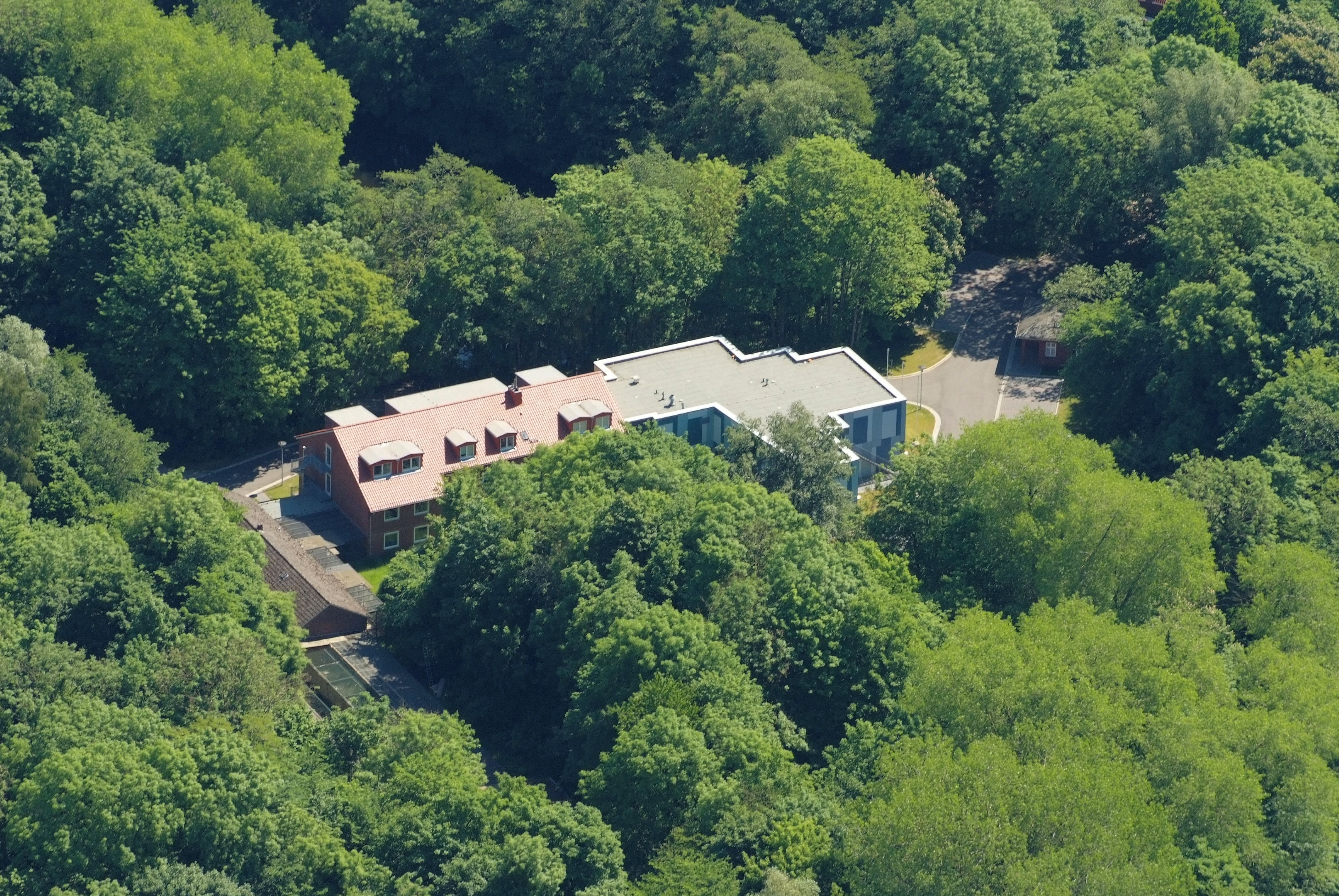 Fotoflug vom Flugplatz Nordholz-Spieka über Cuxhaven und Wilhelmshaven Hier zu sehen: Vogelwarte Helgoland im ehem. Fort Rüstersiel in Wilhelmshaven.